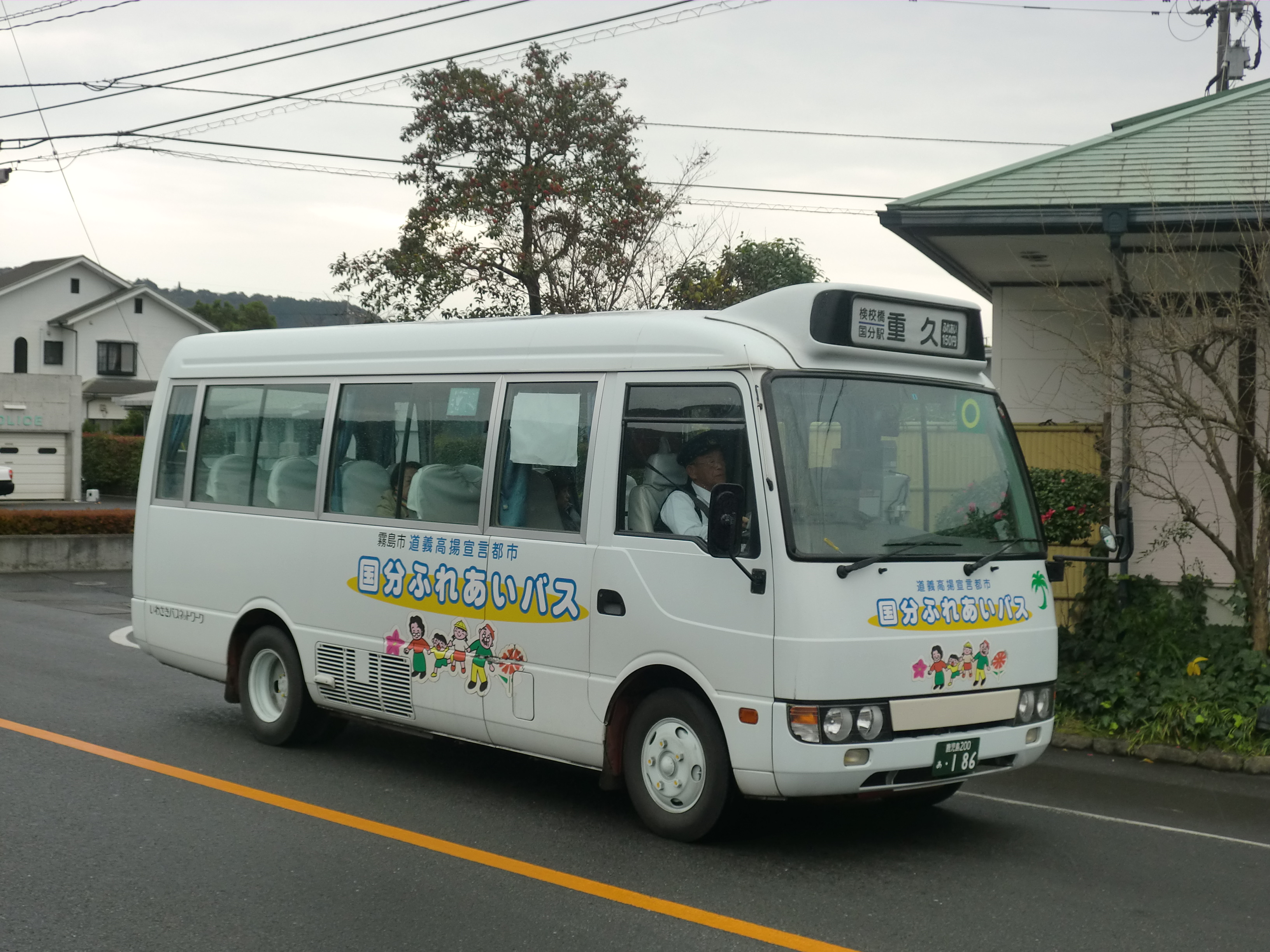 霧島市ふれあいバス。霧島市で撮影